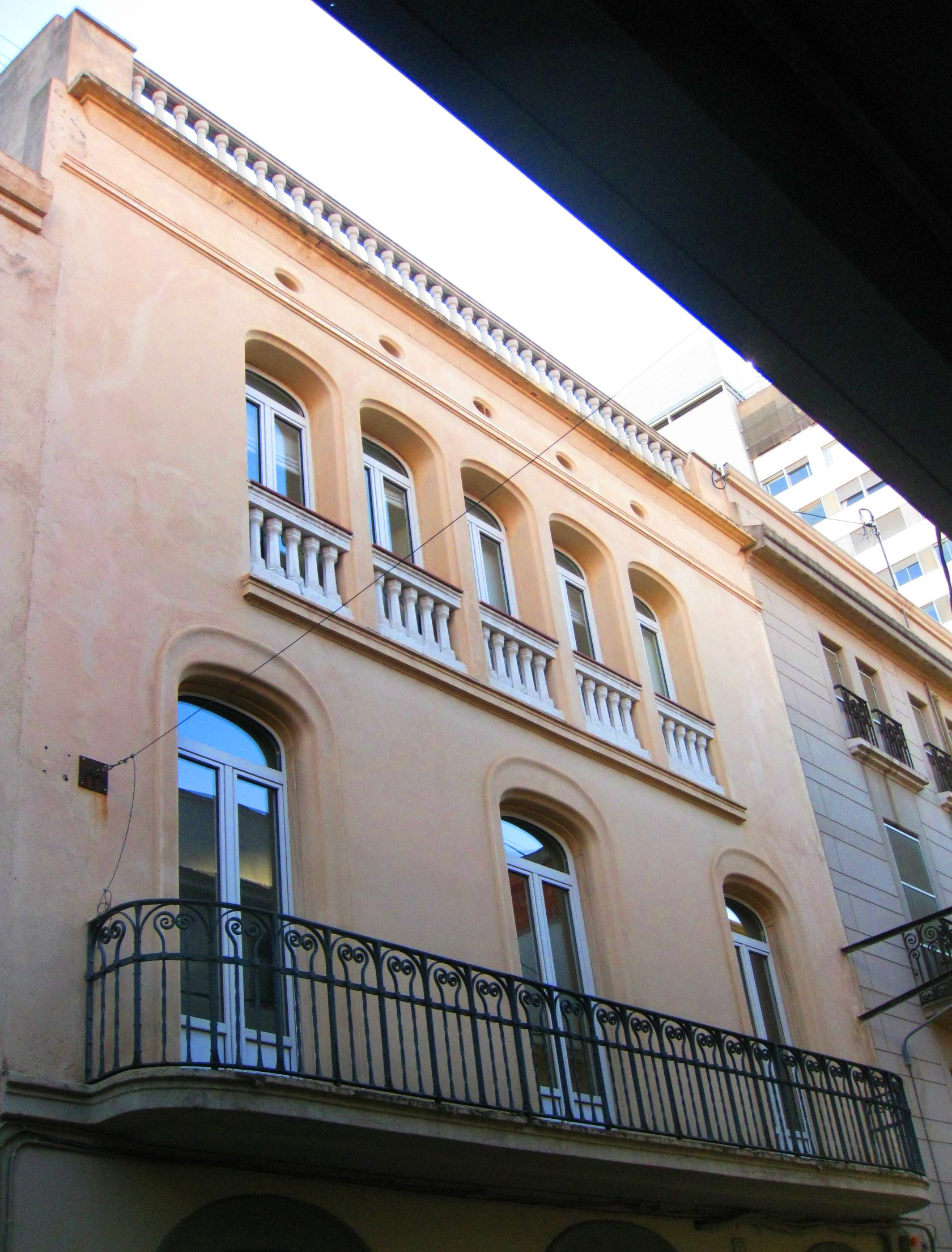 Casa Lluís Salvans, obra de Lluís Muncunill de 1915, al carrer de Sant Antoni núm. 32 (Terrassa).